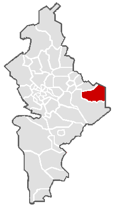 Ubicación geográfica del municipio de General Bravo en el estado mexicano de Nuevo León.